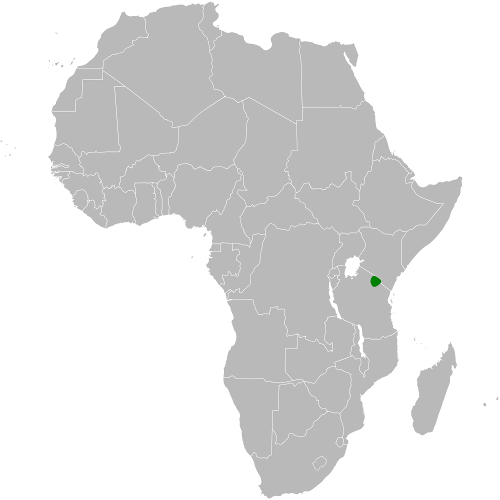 Chersomanes beesleyi distribution map